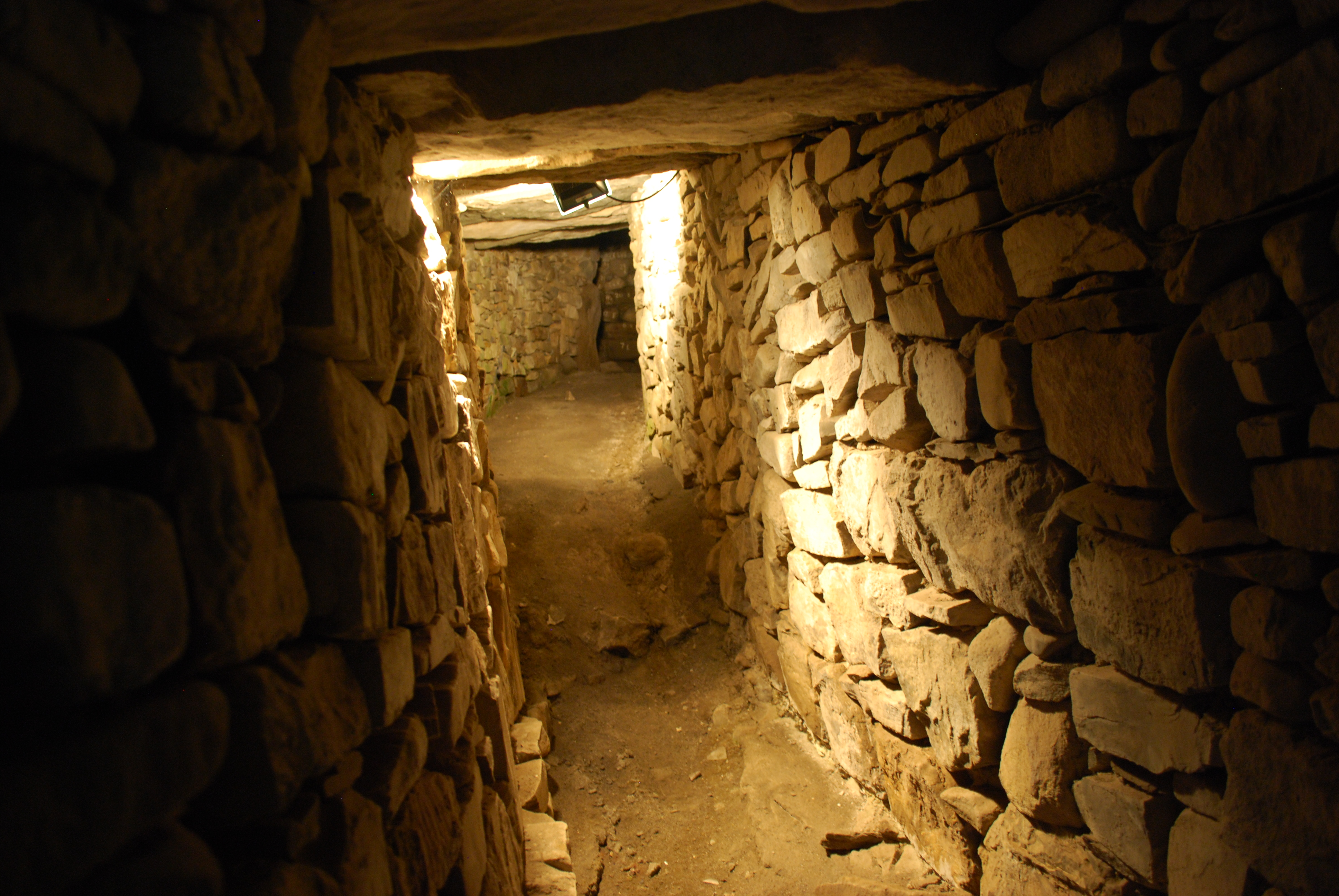 Vue de Knowth, site archéologique de Brú na Bóinne.